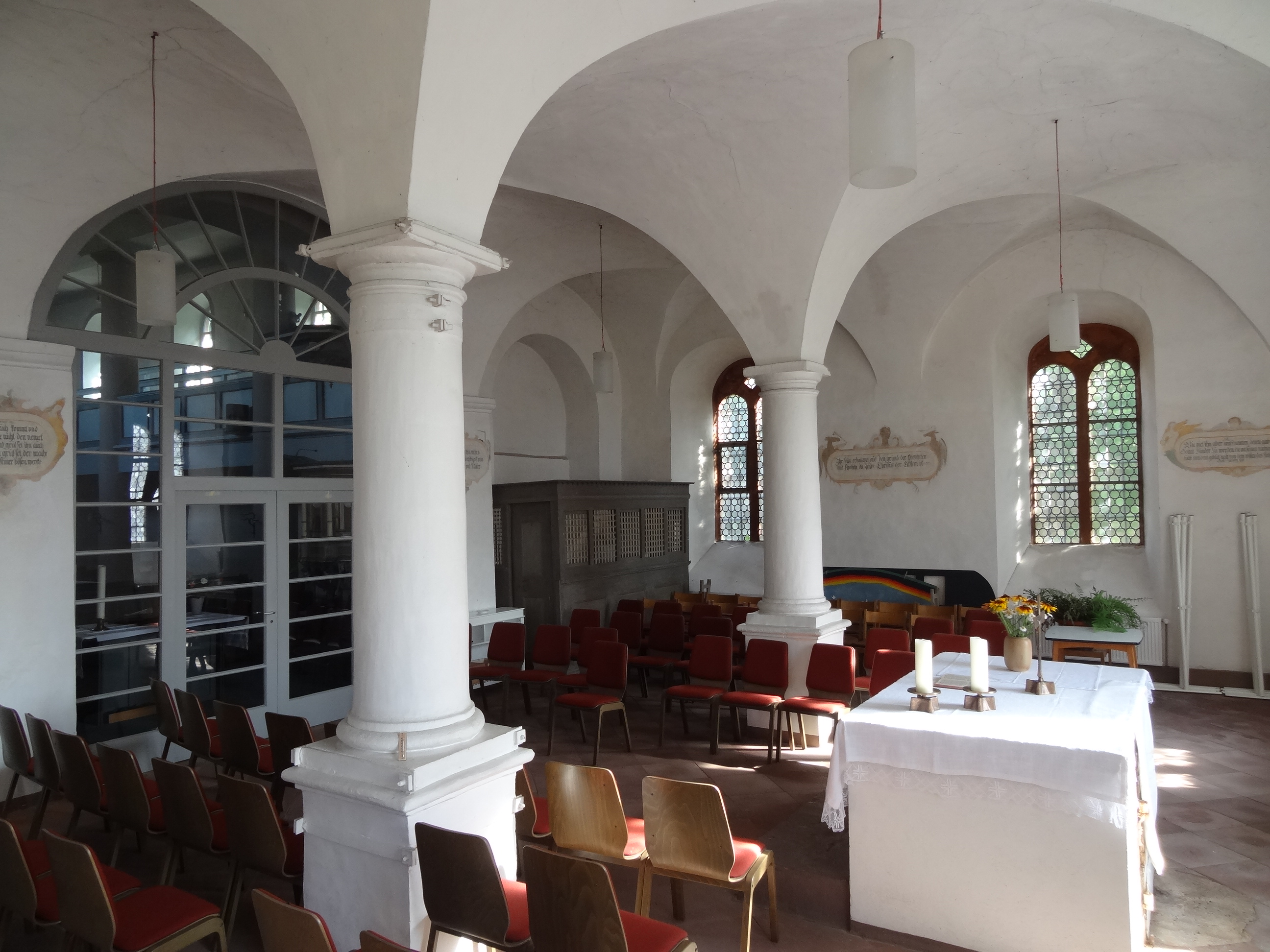 Evangelische Pfarrkirche (Münster, Butzbach)